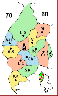 carte du canton de Giromagny (Territoire de Belfort)